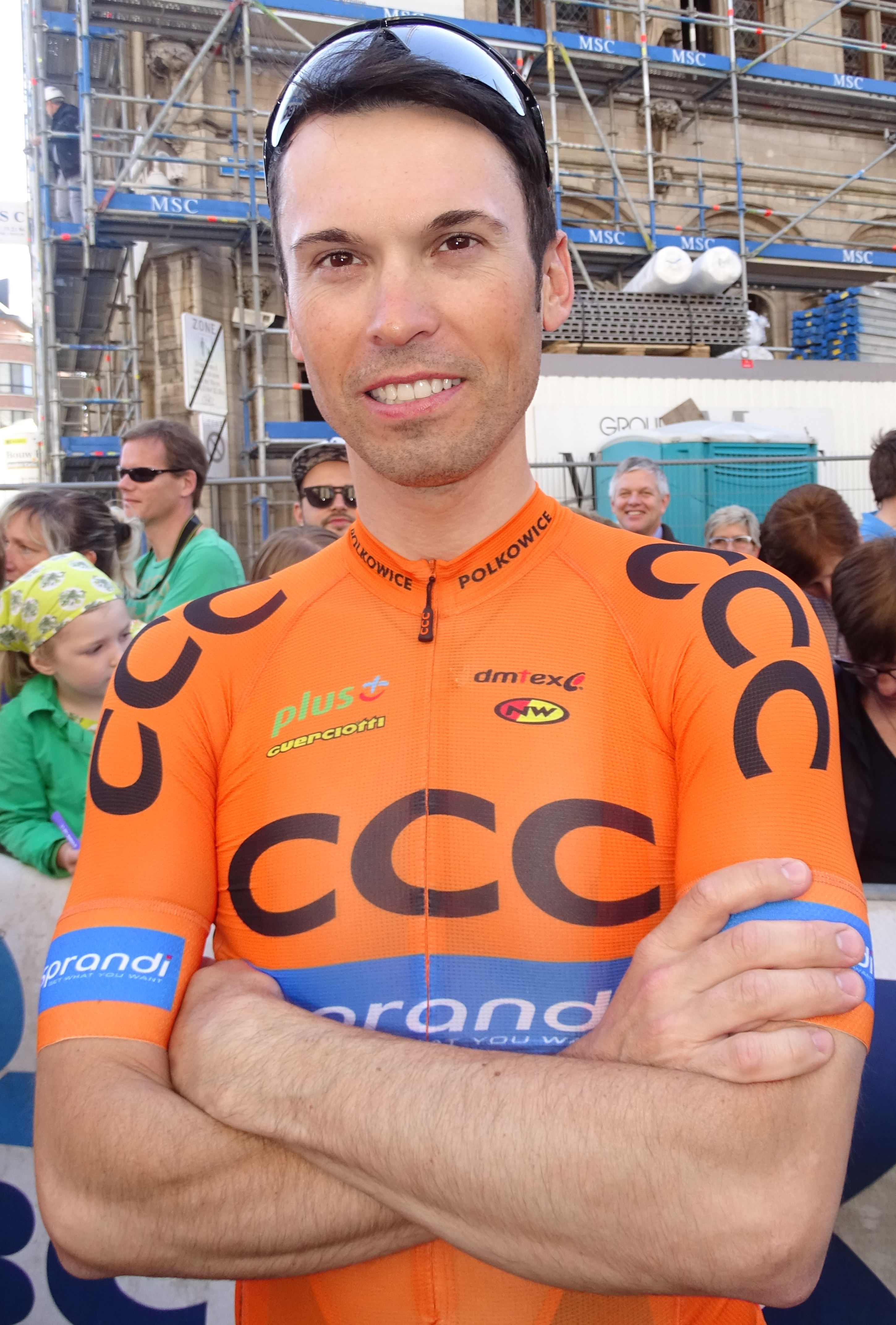 Reportage réalisé le mercredi 15 avril à l'occasion du départ de la Flèche brabançonne 2015 à Louvain, Belgique.